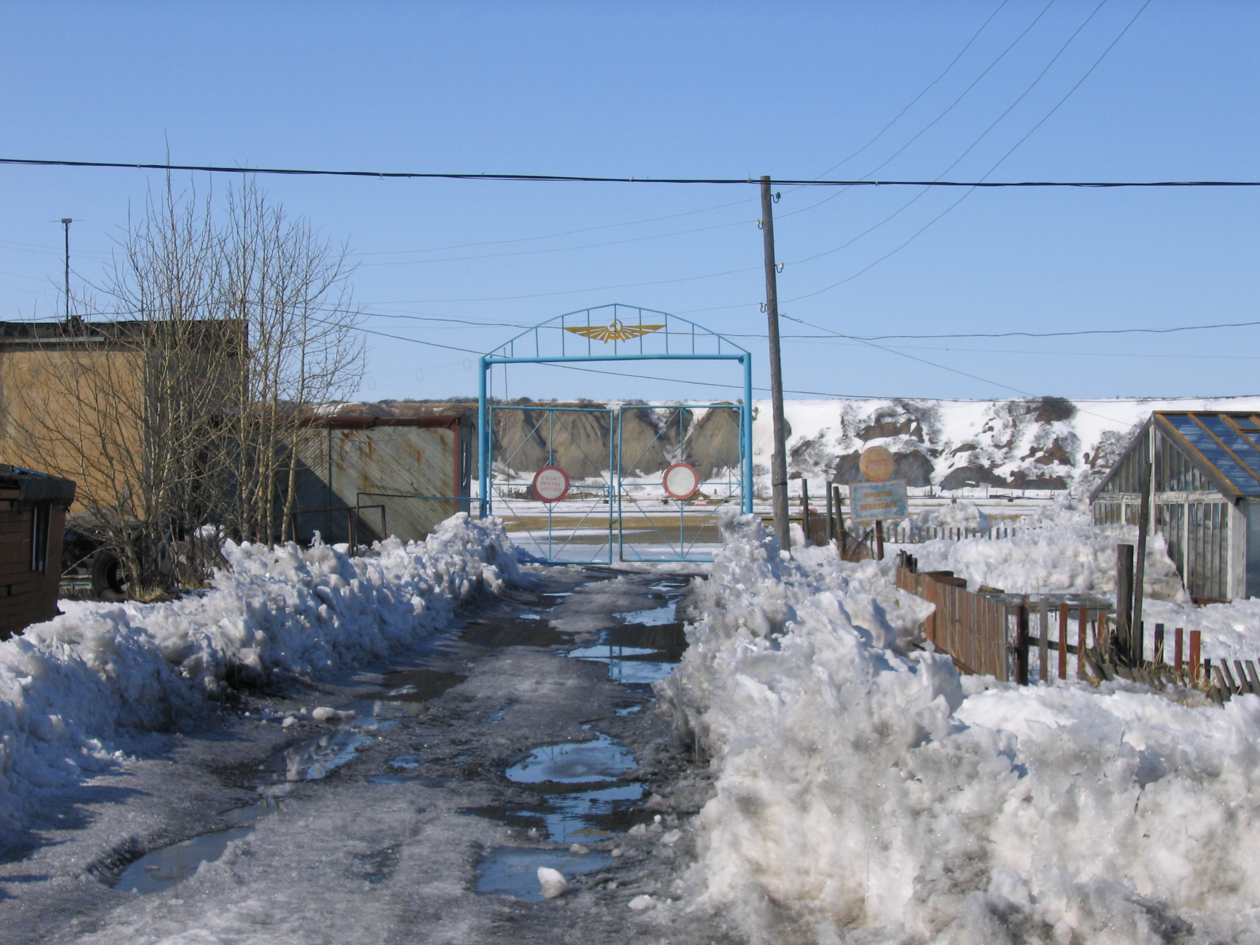 Въезд на территорию аэропорта Эвенск